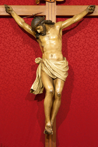 Santísimo Cristo de las Salas Capitulares, 1828 Fernando Estévez de Salas Catedral de Nuestra Señora de los Remedios, San Cristóbal de La Laguna.